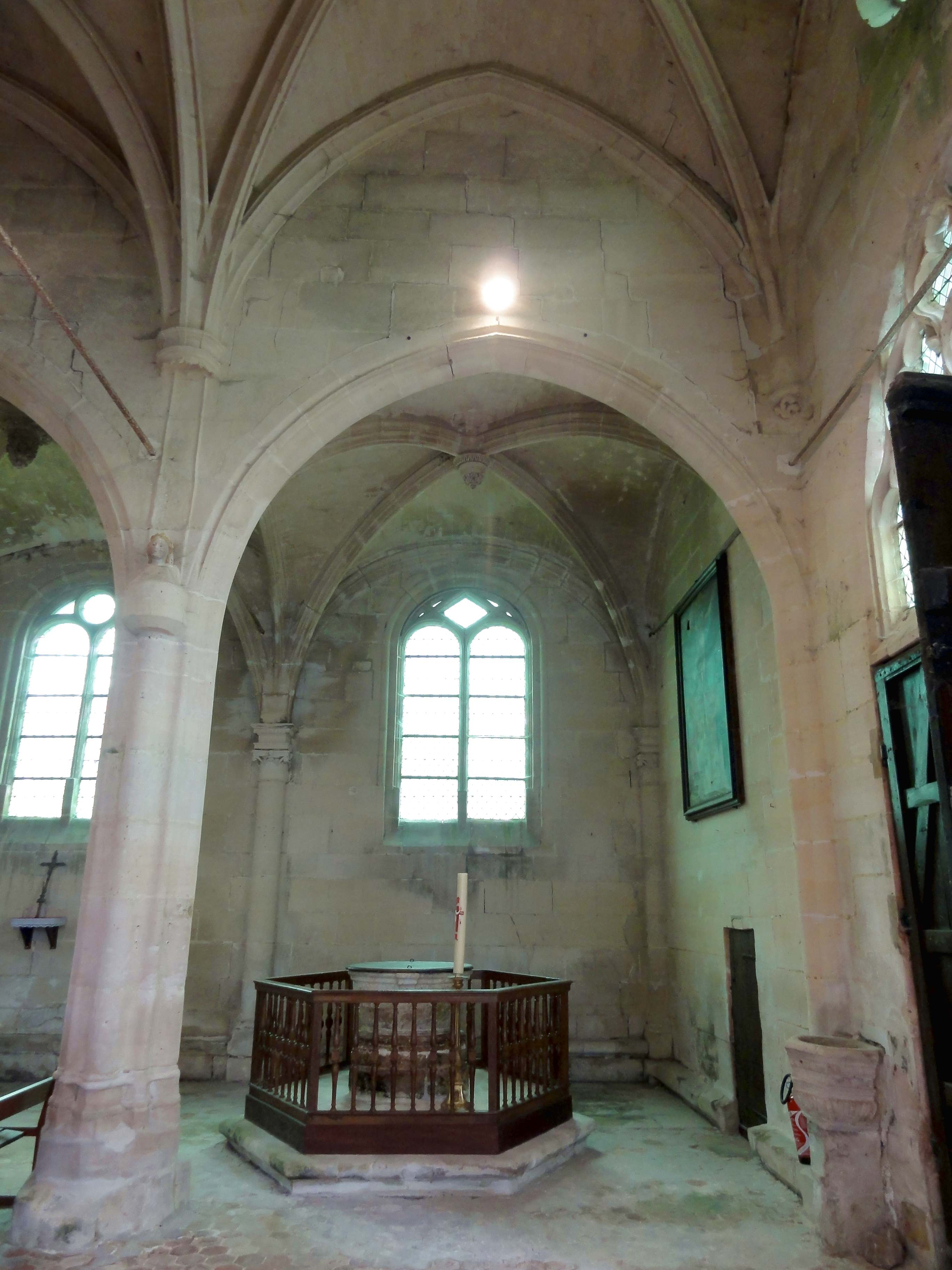 Intérieur de l'église (voir titre).